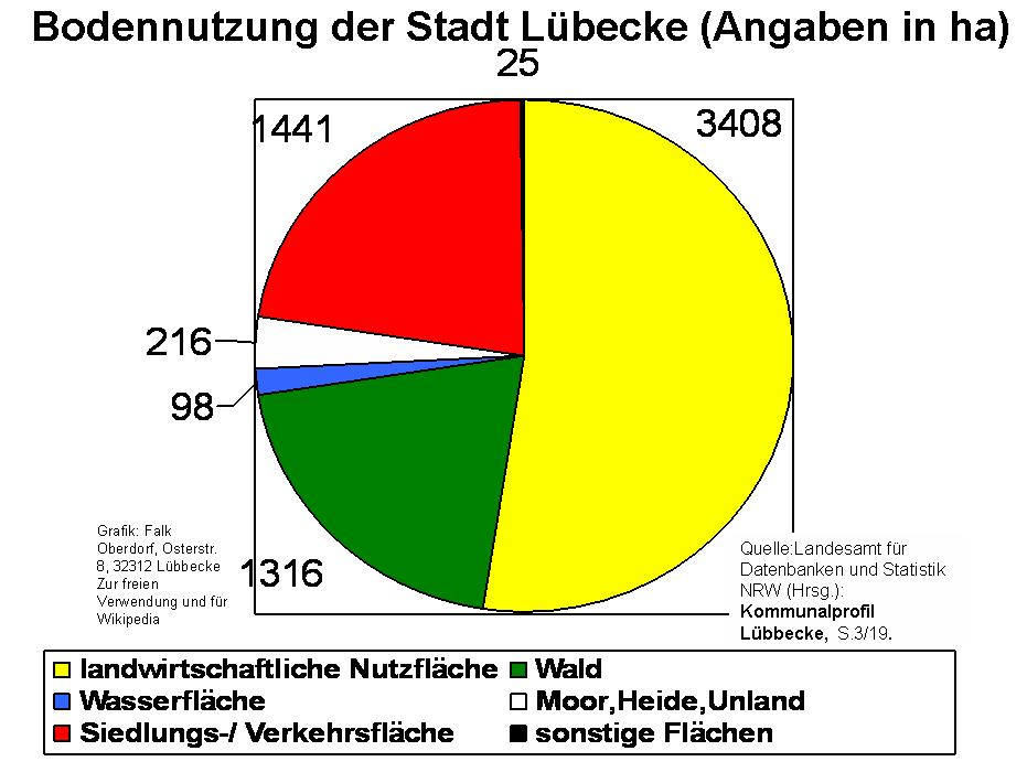 Grafik: Bodenutzung der Stadt Lübbecke